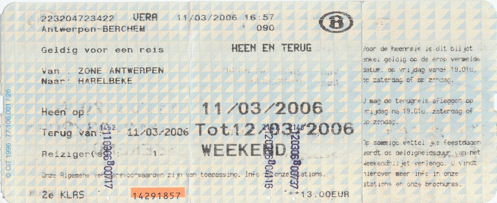 NMBS weekendticket Zone Antwerpen-Harelbeke